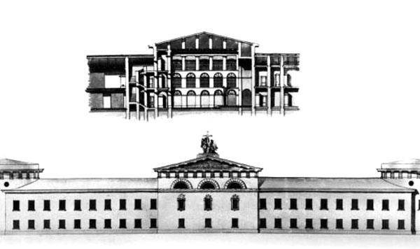 И. И. Шарлемань. Проект Литовского замка